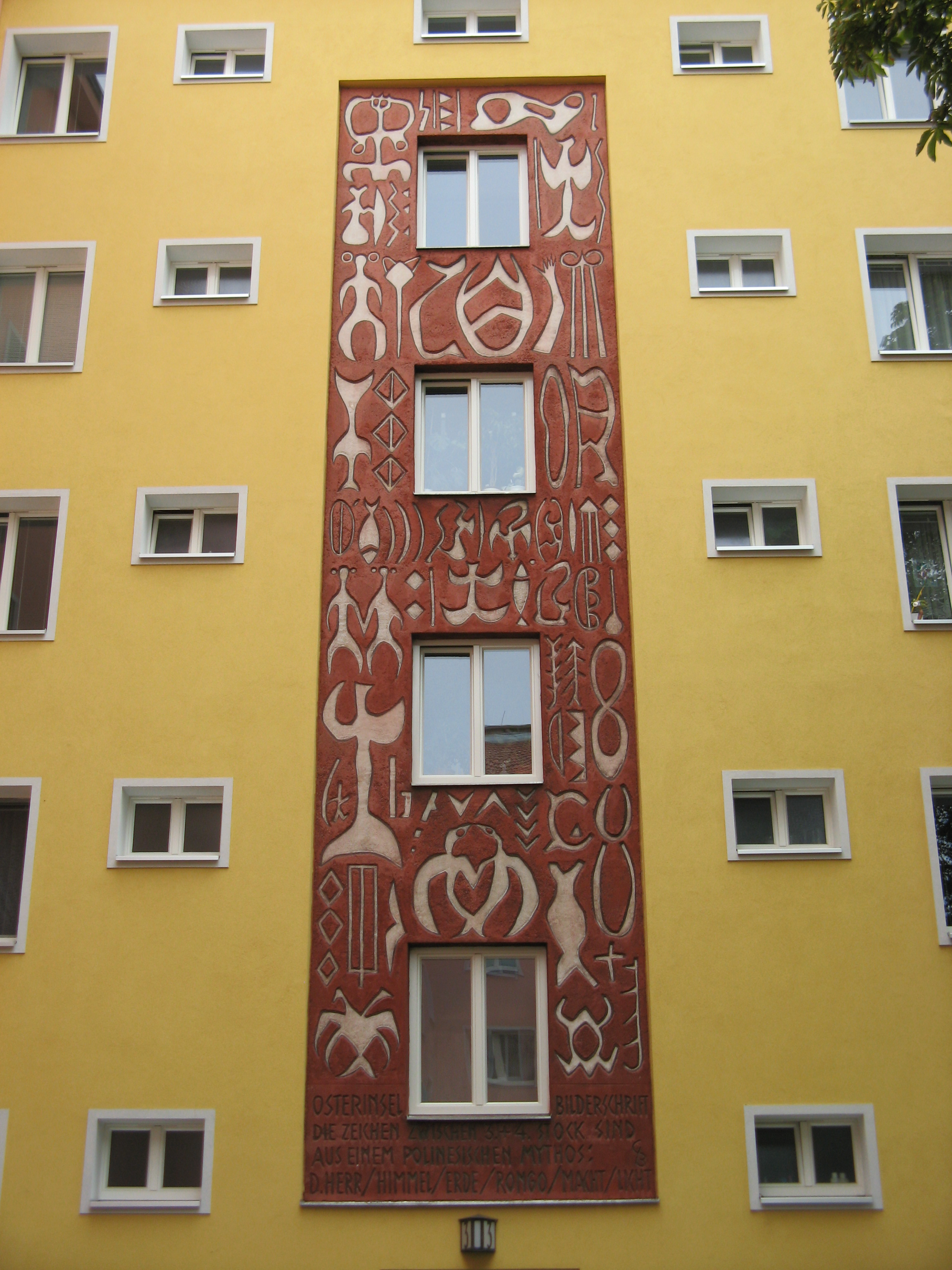 Sgraffito Ozeanische Ornamente (1960) von Karl Bednarik, Wienerbergstraße 14, Wien-Meidling